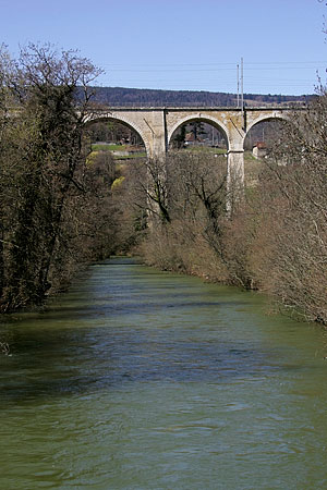 Boudry: l'Areuse et le viaduc CFF